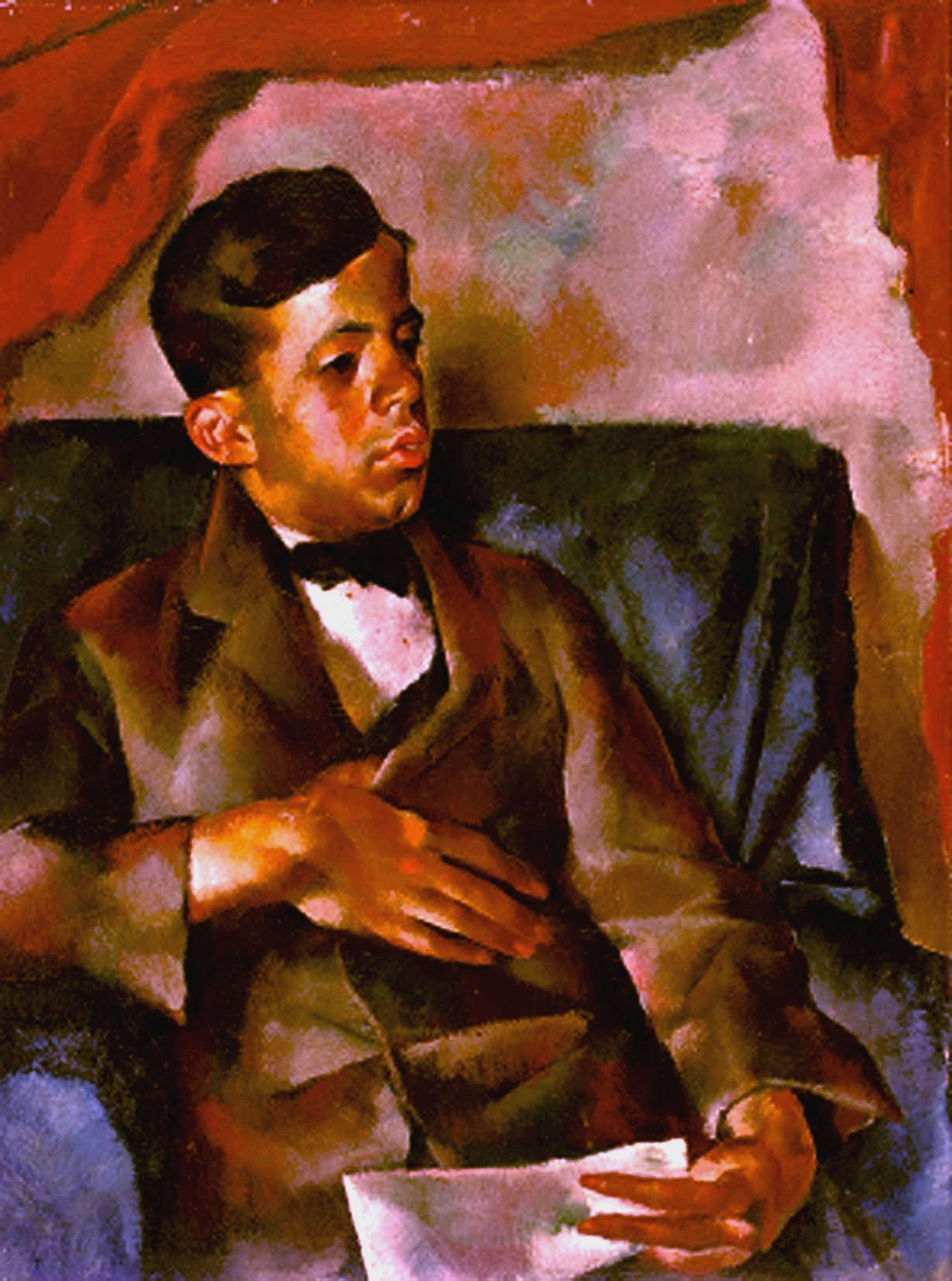 Schilderij van Géza Frid uit Boedapest rond 1925, gemaakt de later wereldberoemde schilder Vilmos Aba Novák